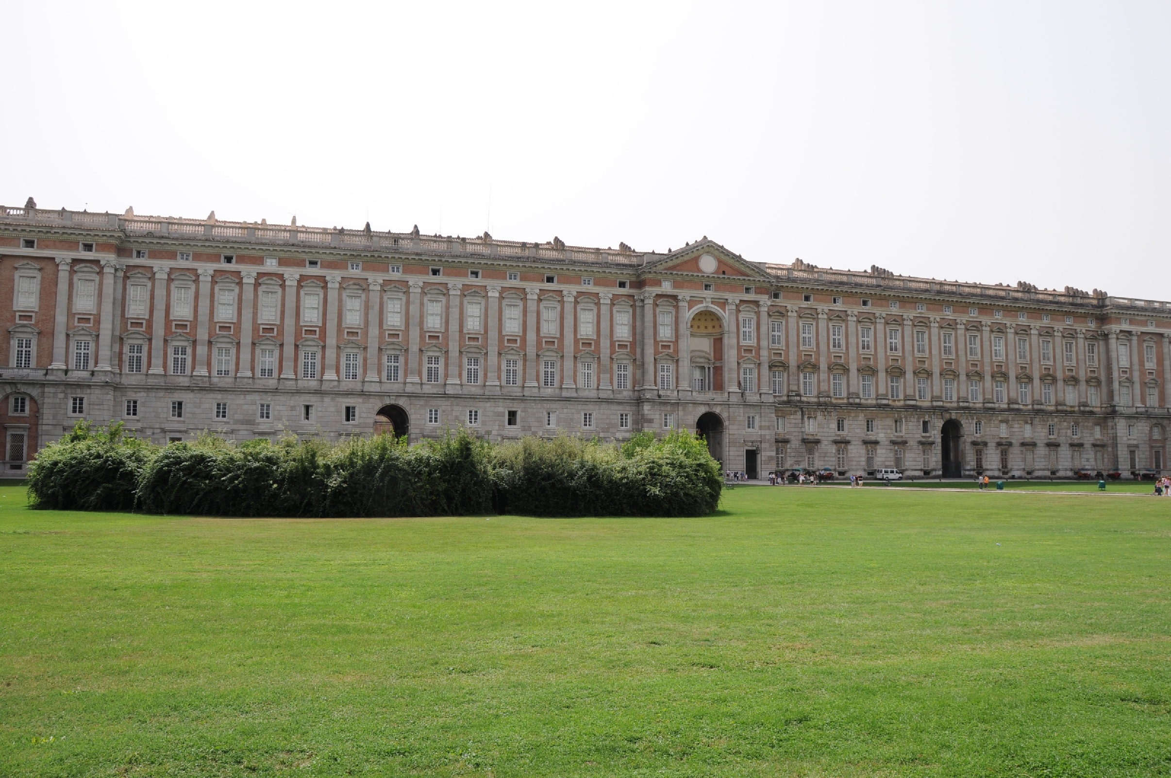 Assemblea WIkimedia Italia 2008 - Caserta